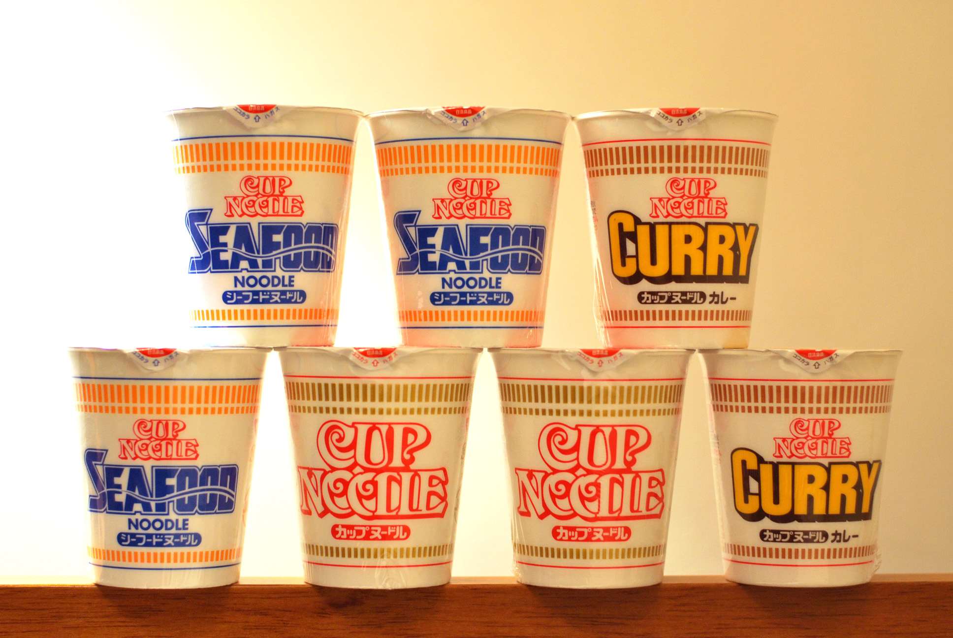 ”カップヌードルもセールしてたので買いだめてきたｗ。118円｡前はセールだったら90円くらいだったよなあ。。。写真撮るかーと思って並べたら、あと2つや3つ買ってくるべきだったかと真剣に考えてた自分に笑った｡”